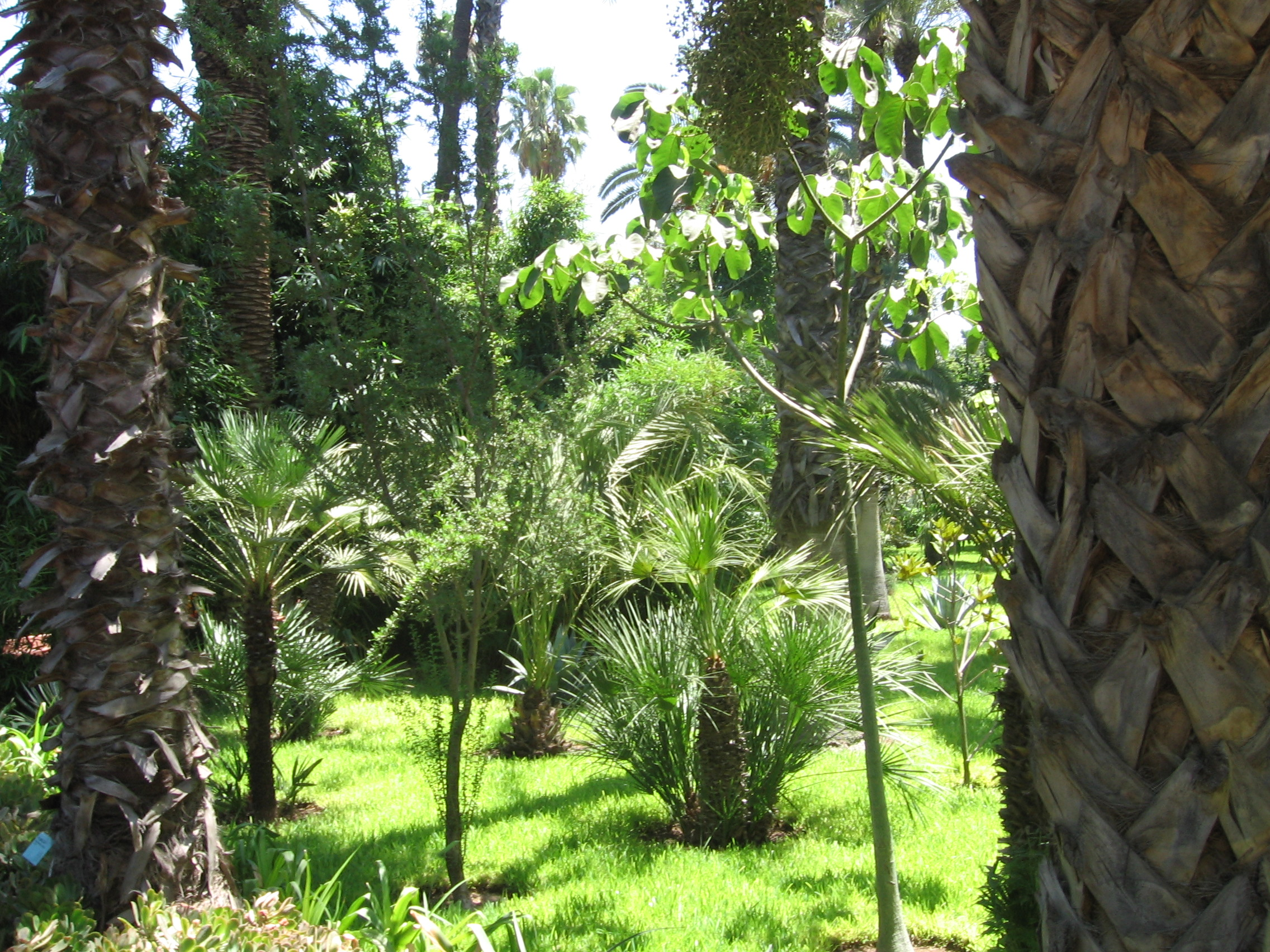 jardin de majorelle